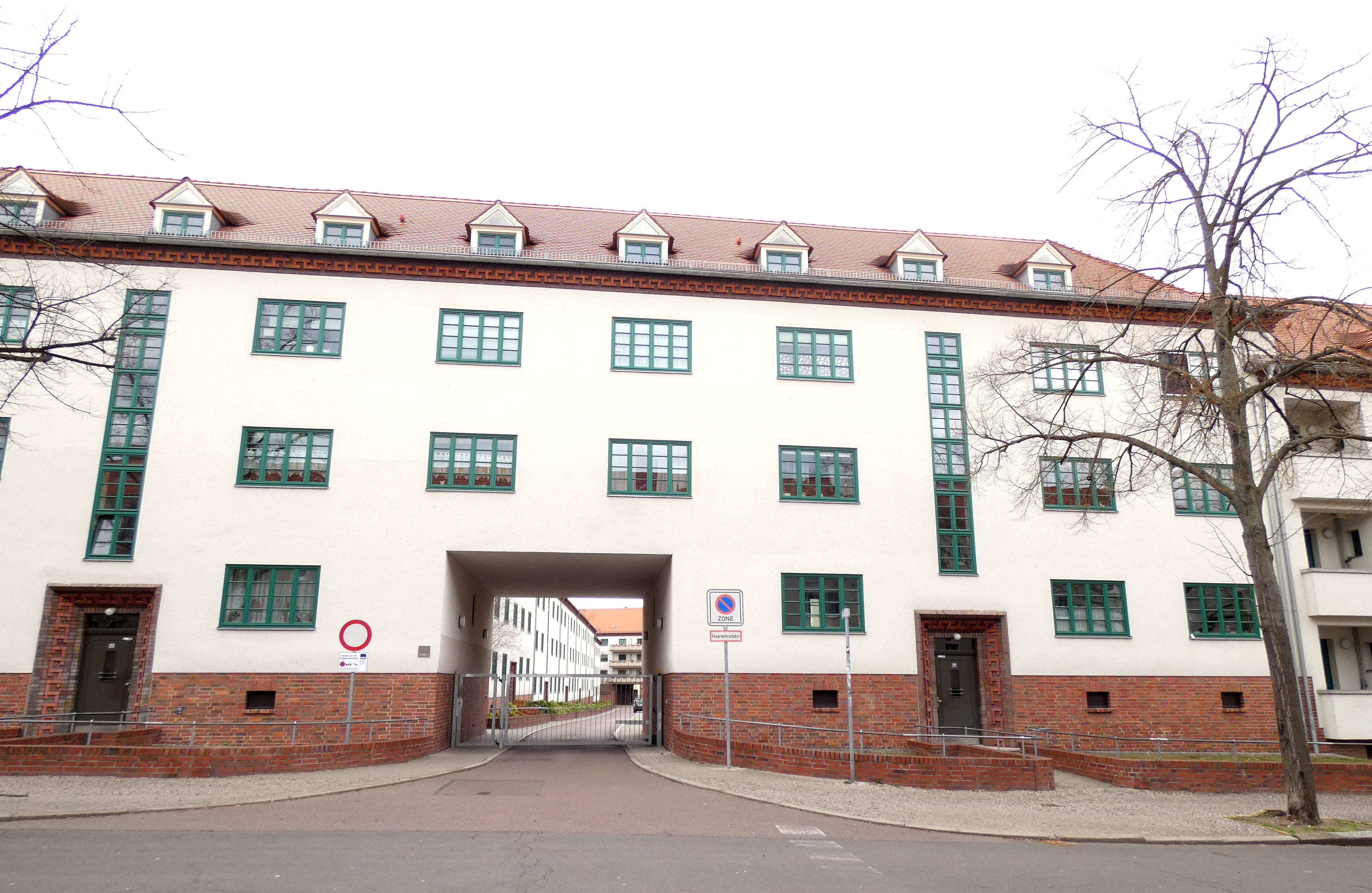 Fischer-von-Erlach-Straße 33 und 37, Siedlung Reilshof, Halle (Saale)